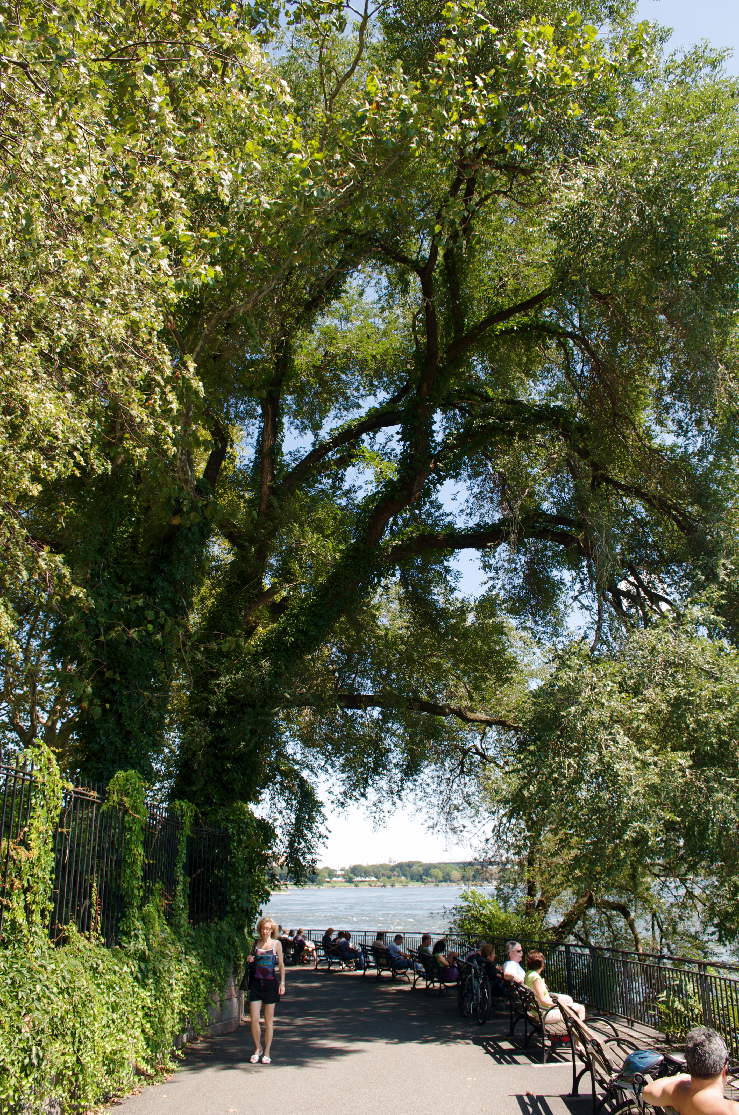 Carl Schurz Park